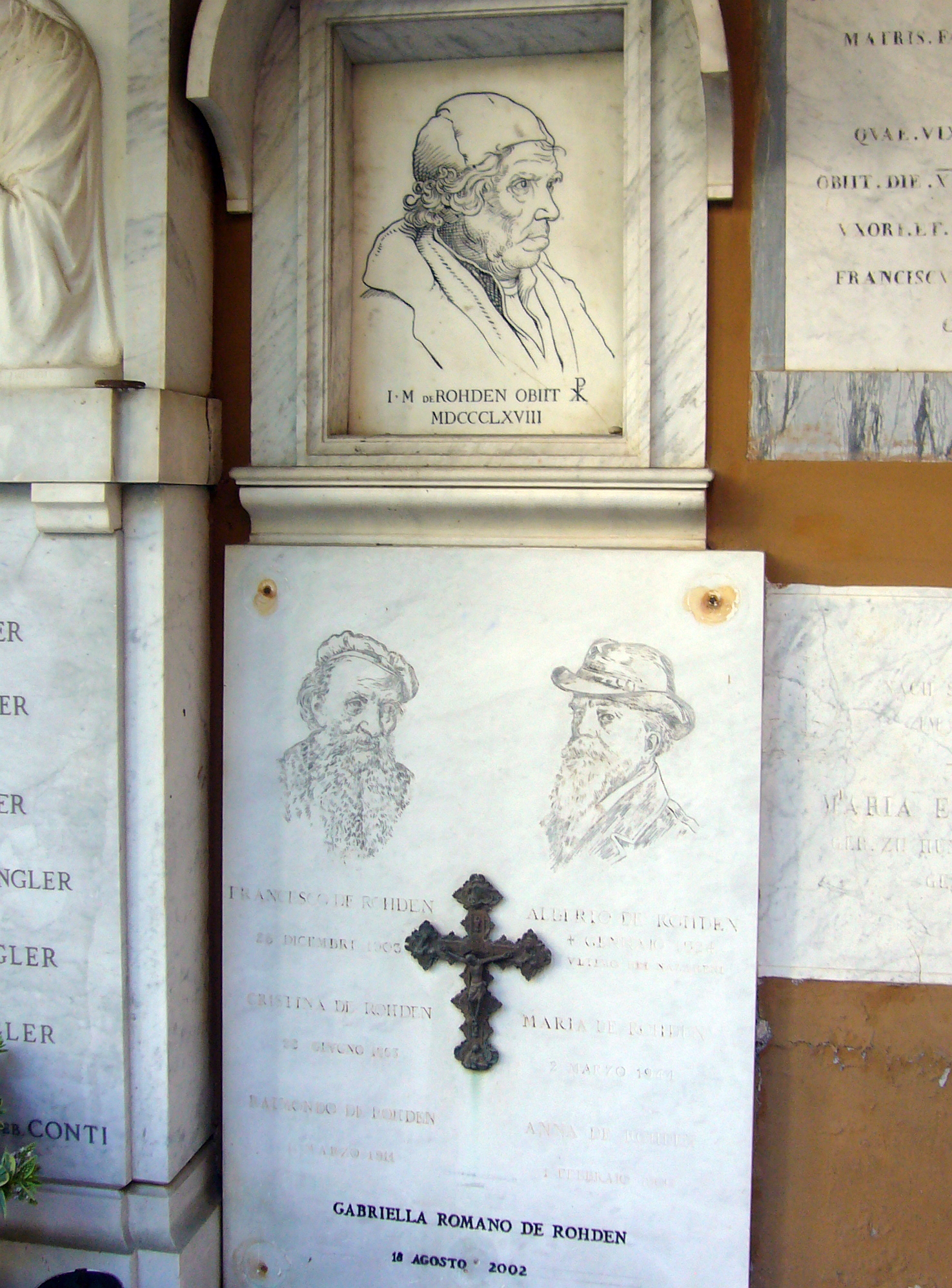 Deutscher Friedhof